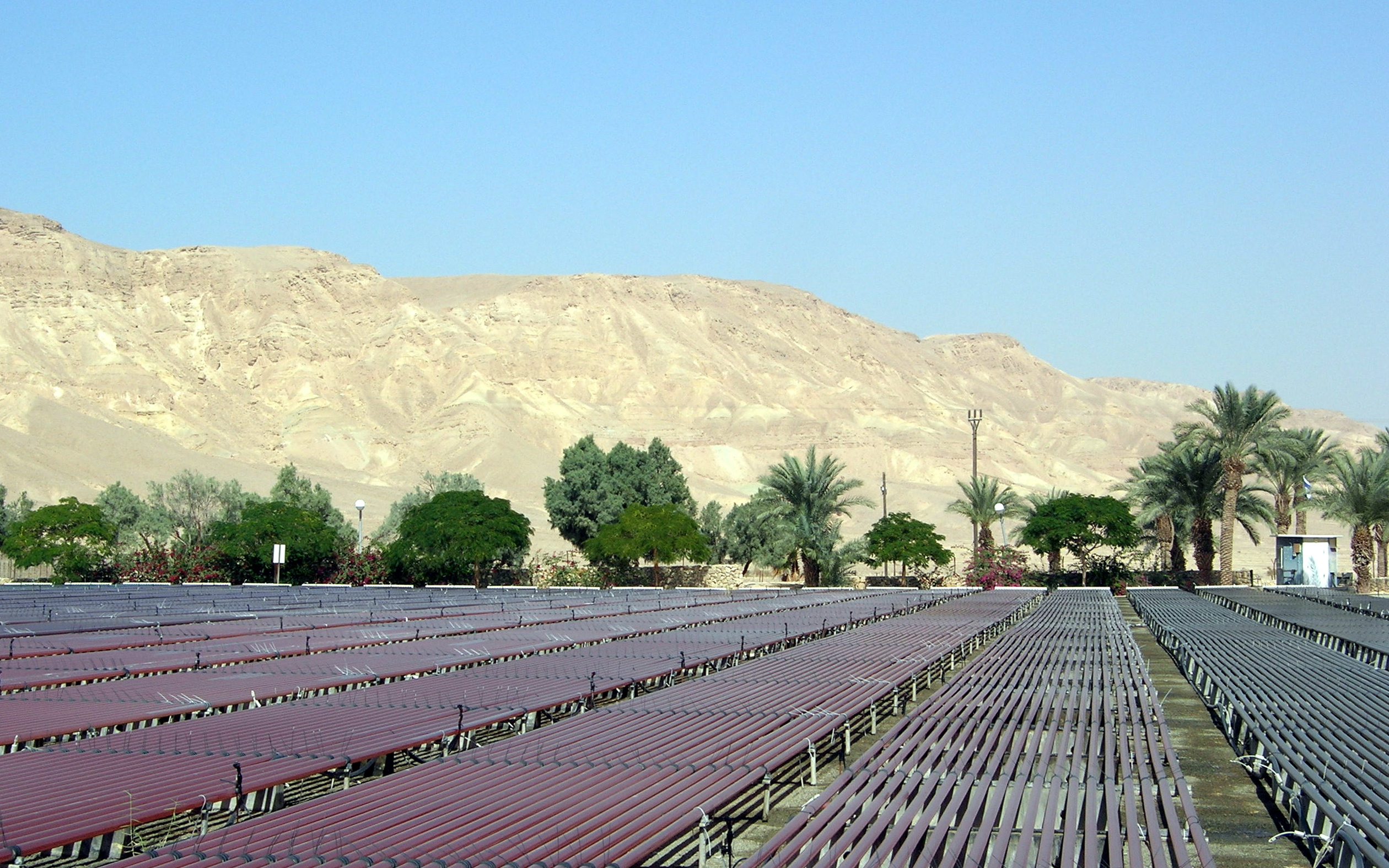 Description =Algoculture au kibboutz Ketura dans le désert du Neguev (Israel) Source =Photo taken by Remi Jouan Date =Novembre 2005 Author =Remi Jouan